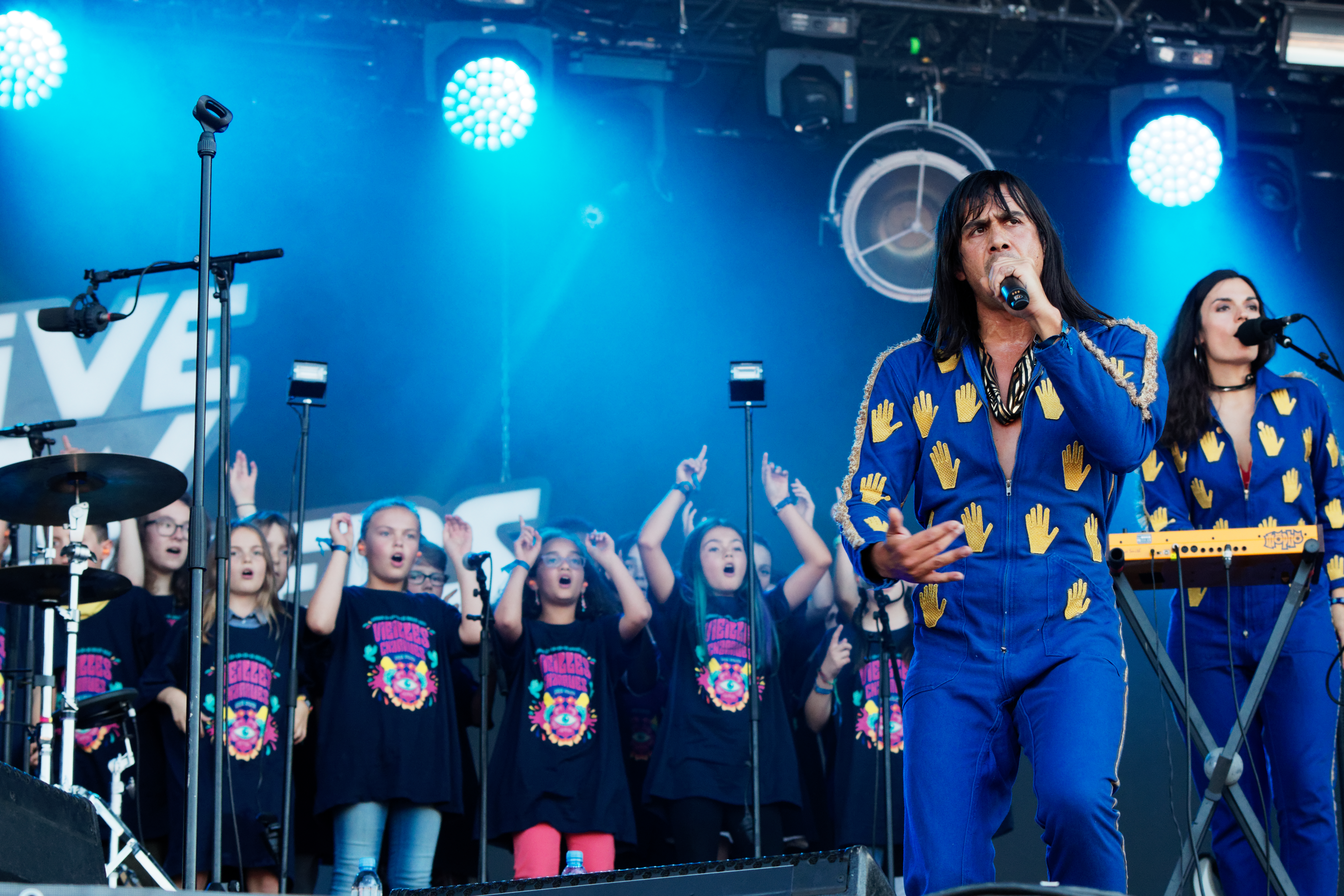 Naïve New Beaters en concert lors du festival des vieilles charrues 2017.